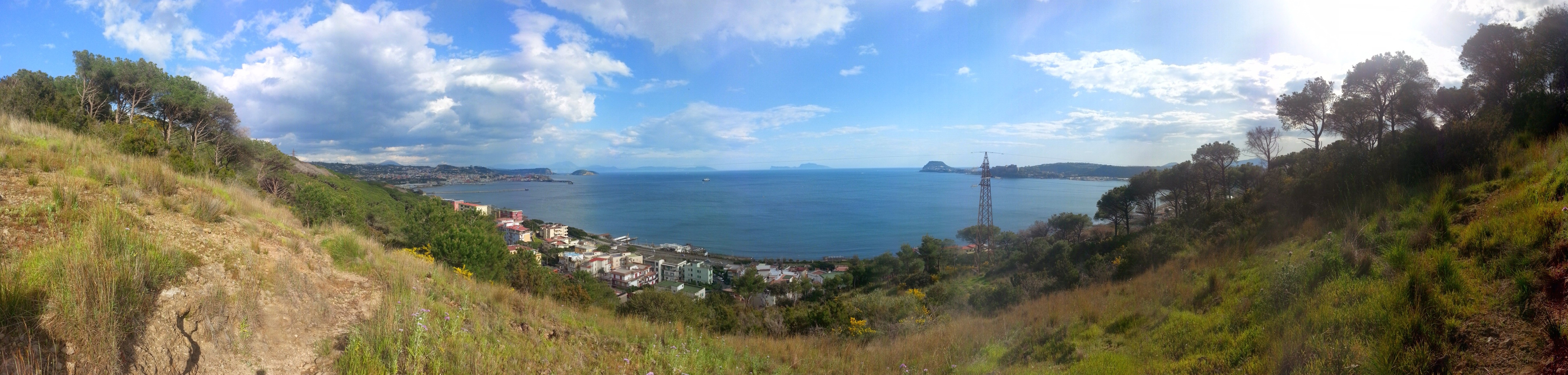 Golfo di Napoli